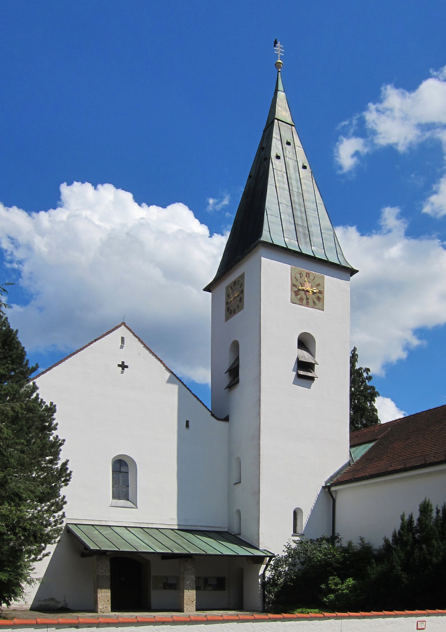 Pfarrkirche St. Peter und Paul, Zeillerstraße 2; rechts im Bild der Anbau der Alten Pfarrkirche, spätgotisch, 2. Hälfte 15. Jh., jetzt Kriegergedächtnisstätte; im ehem. Friedhof drei schmiedeeiserne Grabkreuze, 18. Jh.